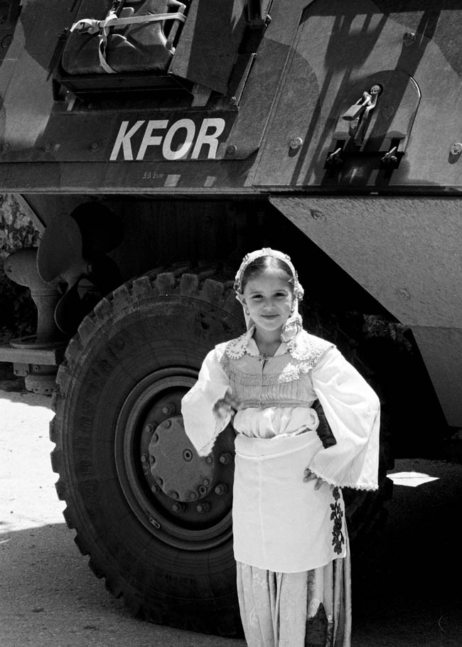 Косово и Метохија: Српска и неалбанска деца одрастају уз транспортере КФОР-а . Фото:Дарко Дозет